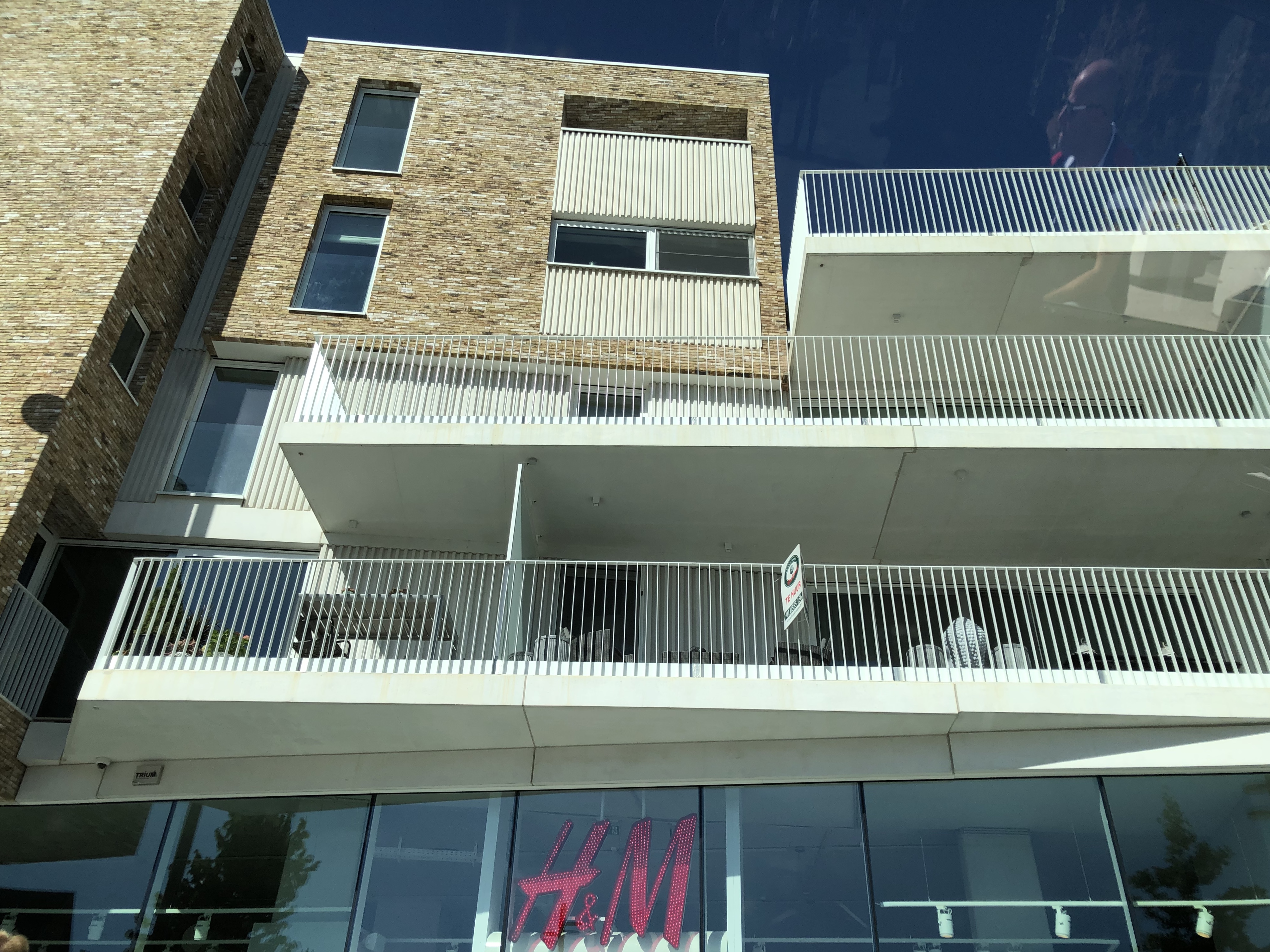 Lommel, België, September 2019